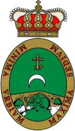 Escudo oficial